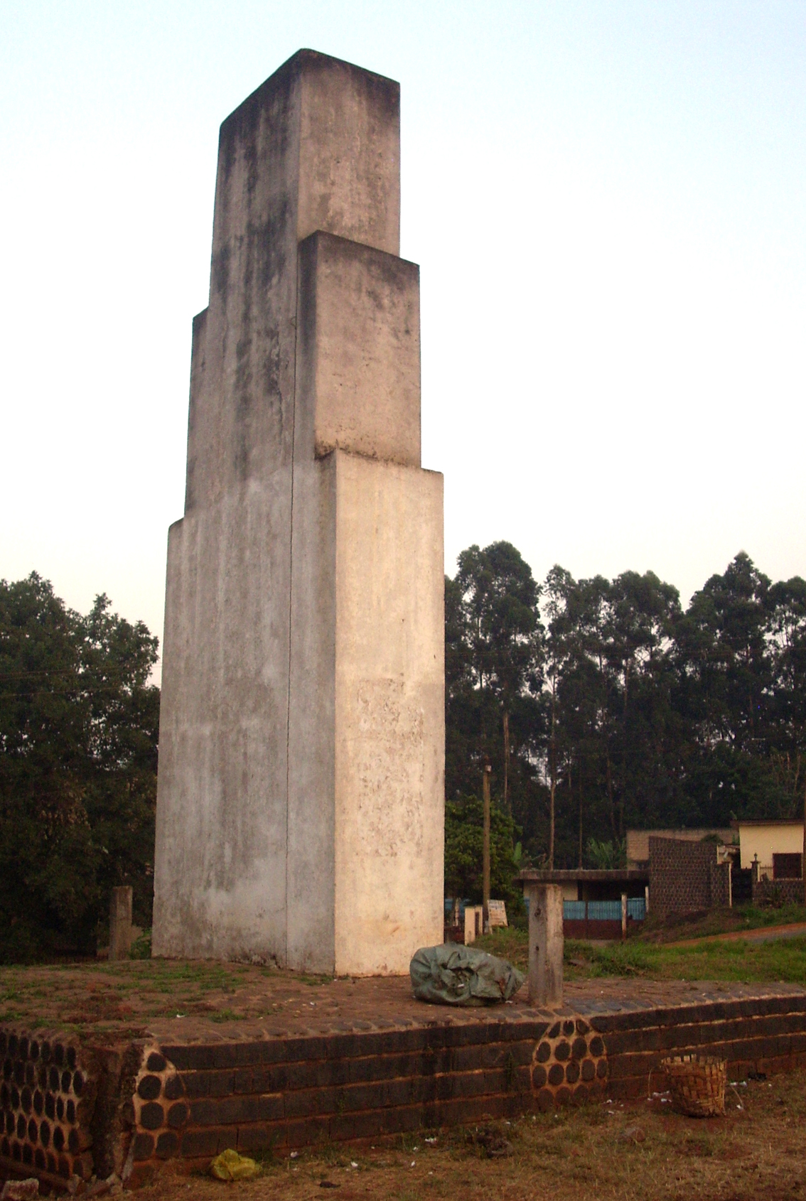 monument wanko - Bafoussam - Cameroun